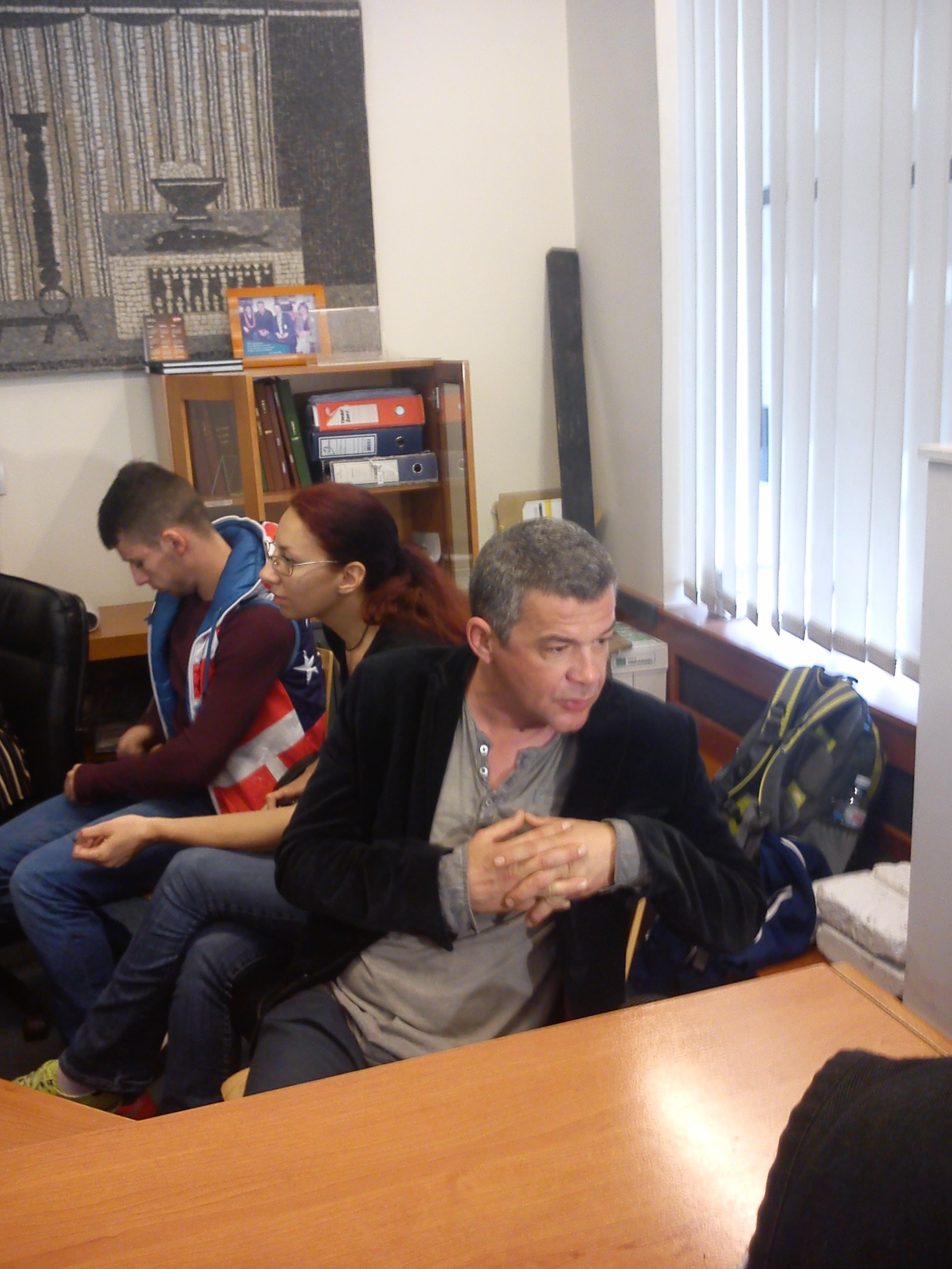 Небојша Глоговац у Библиотеци града Београда на прослави Светског дана књиге 23. априла 2014. године.